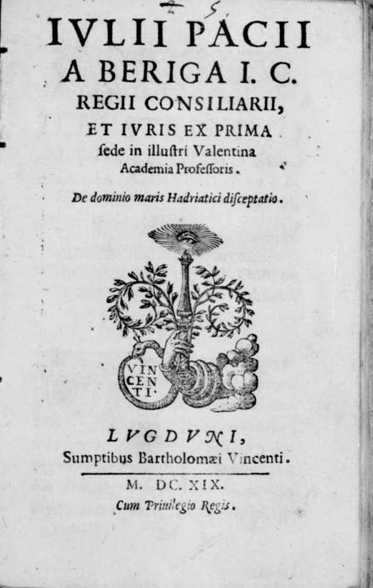 Frontespizio